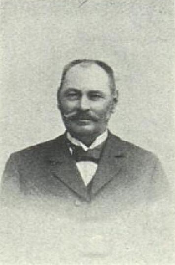 Václav Struna (1854-1910), rakouský a český politik